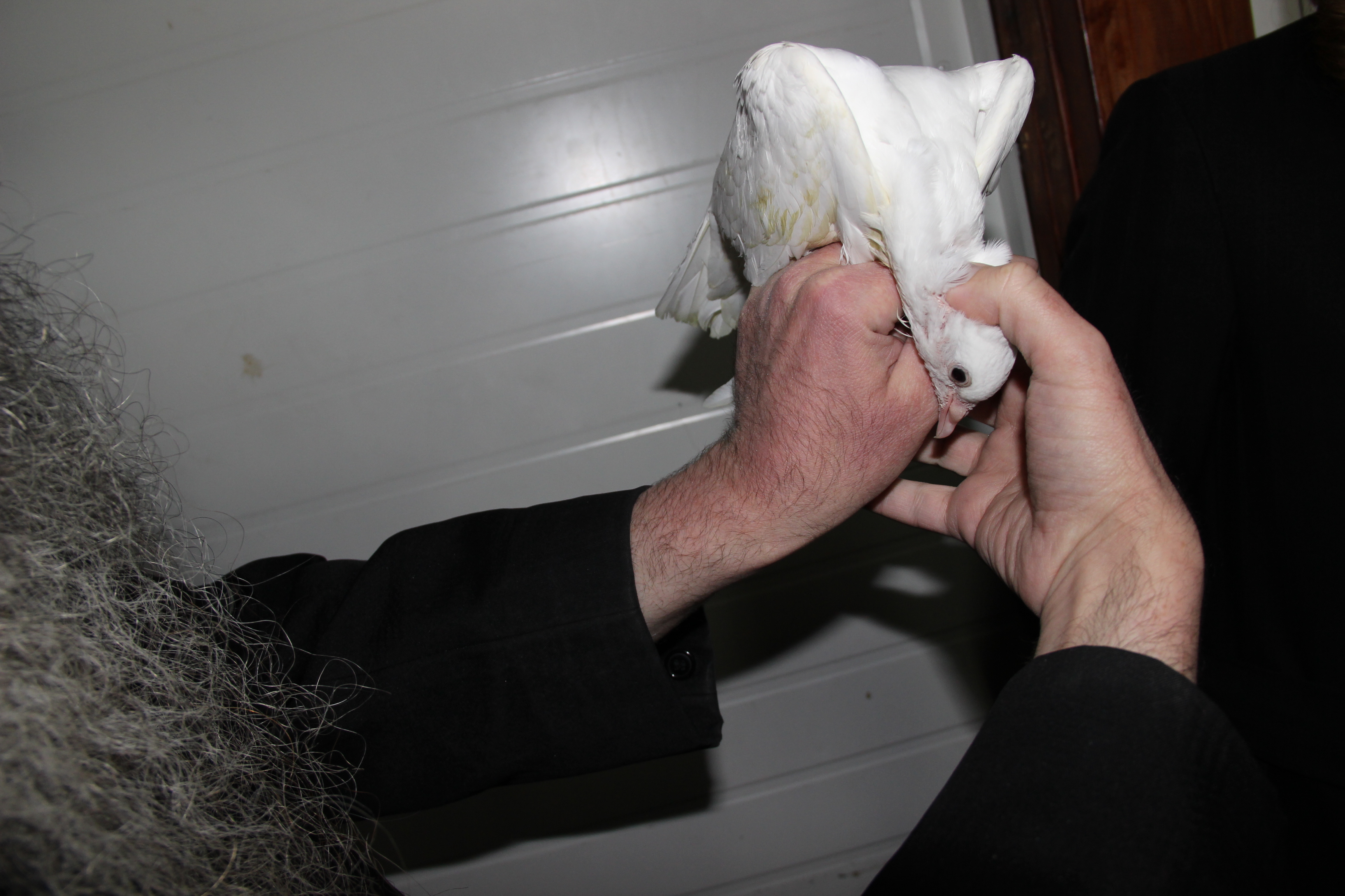 כולל אמר אביי